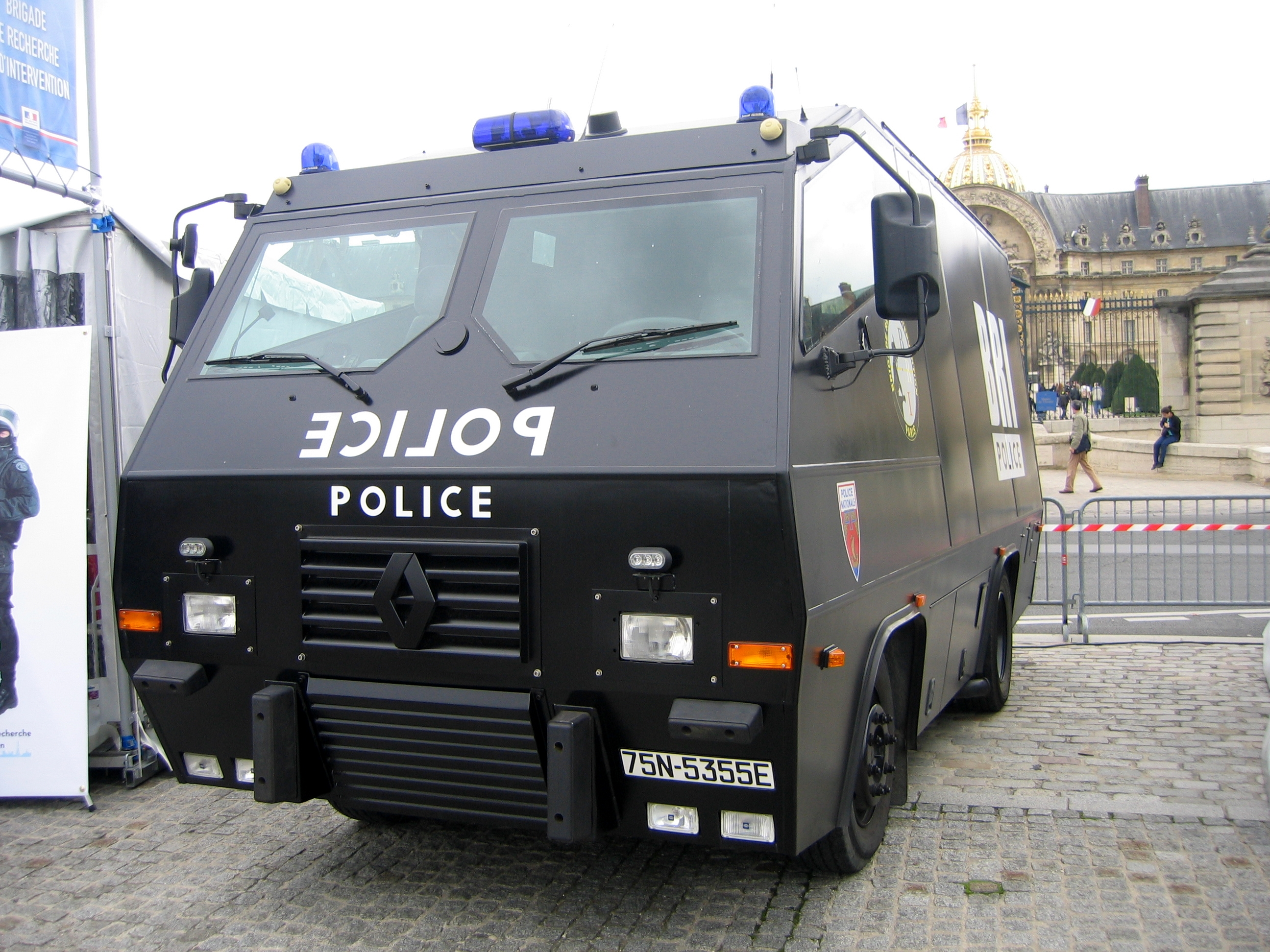 Véhicule blindé de la police française lors des journées de sécurité intérieures 2009 sur l'esplanade des Invalides.